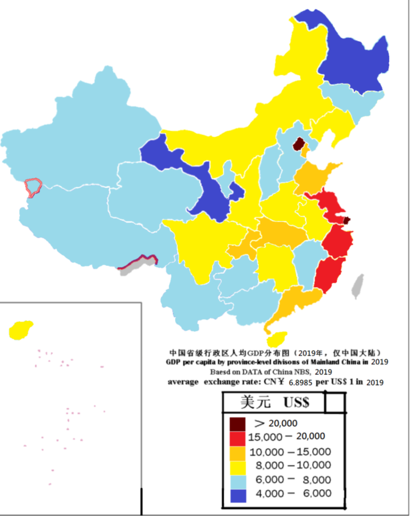 2019年中國各省人均GDP分布